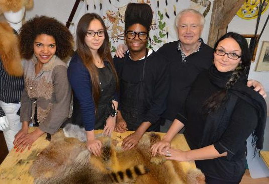 Udo Meinelt & Söhne, Rötha. In der Mitte Wesley Petermann, rechts davon der Seniorchef Udo Meinelt mit weiteren Auszubildenden.